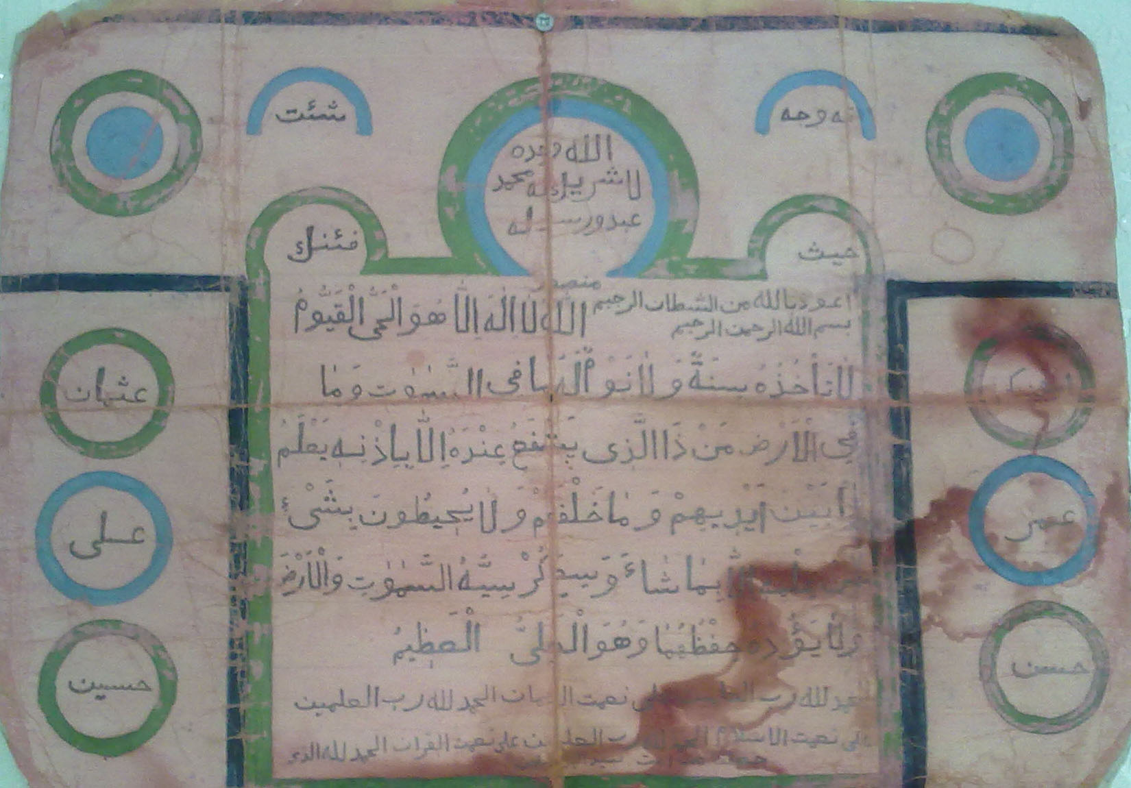 Татарча/tatarça: Татар шәмаиле